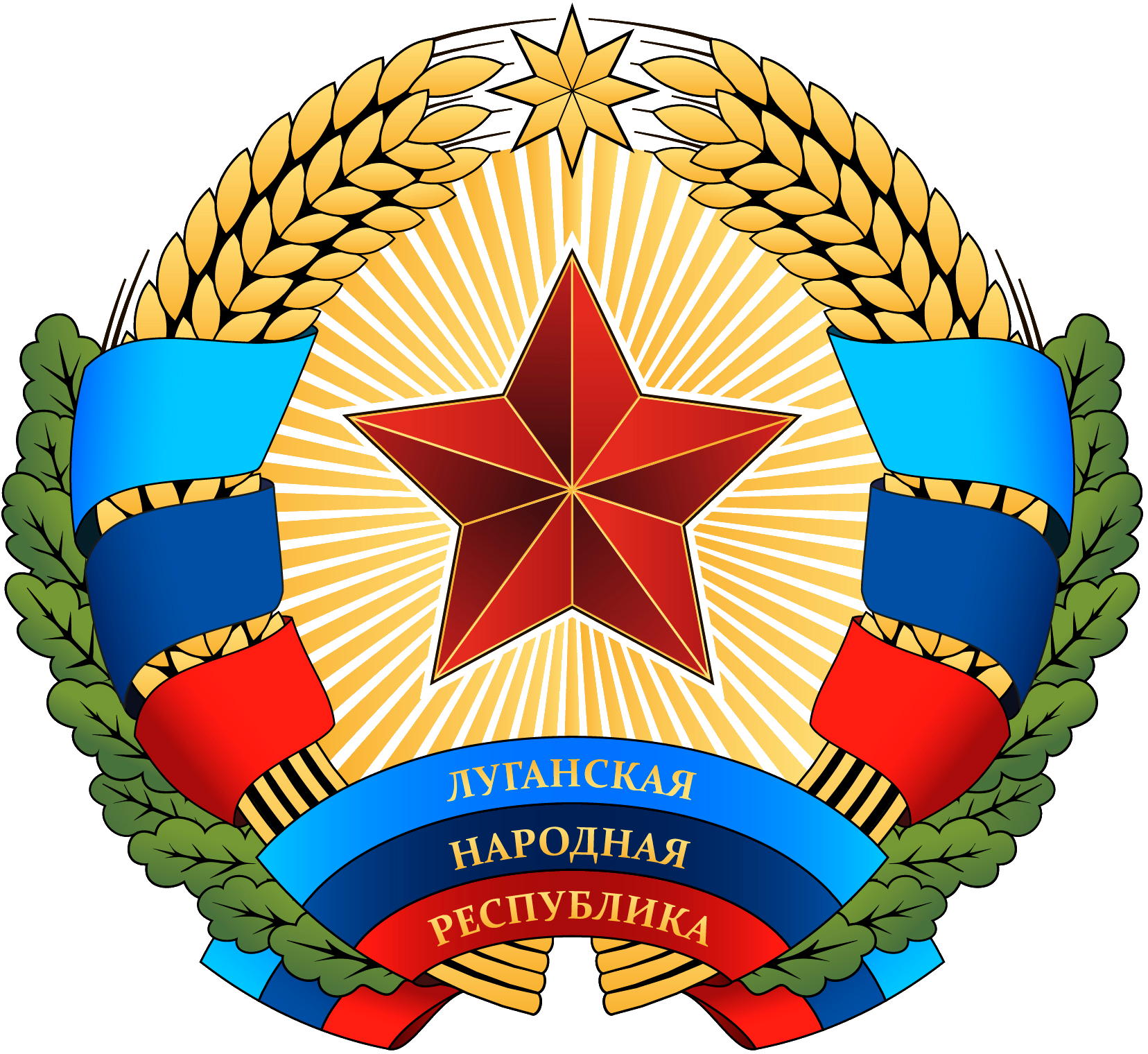 Герб Луганской Народной Республики.